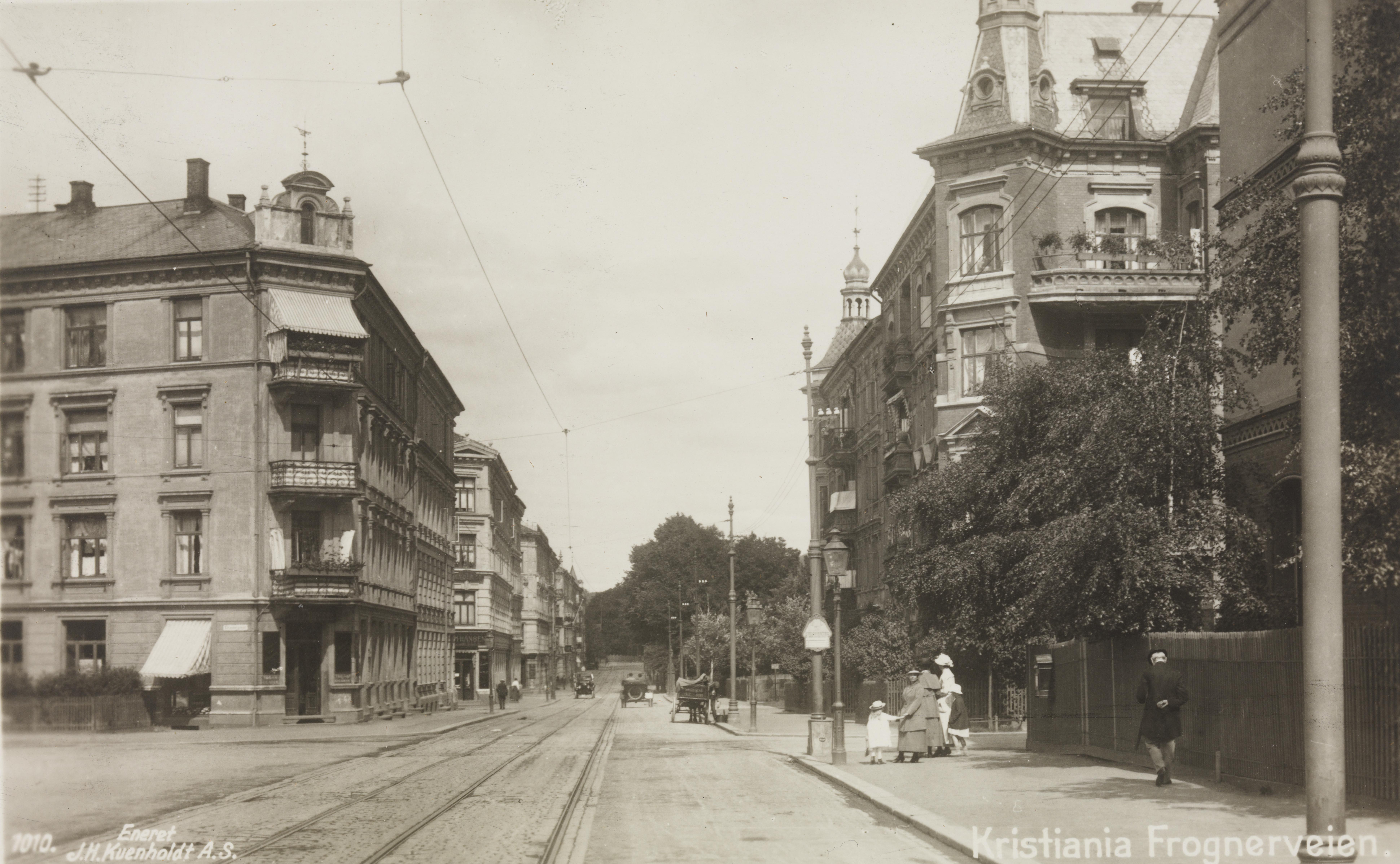 Bildet er hentet fra Nasjonalbibliotekets bildesamling Frogner,Frognerveien, Oslo, Oslo